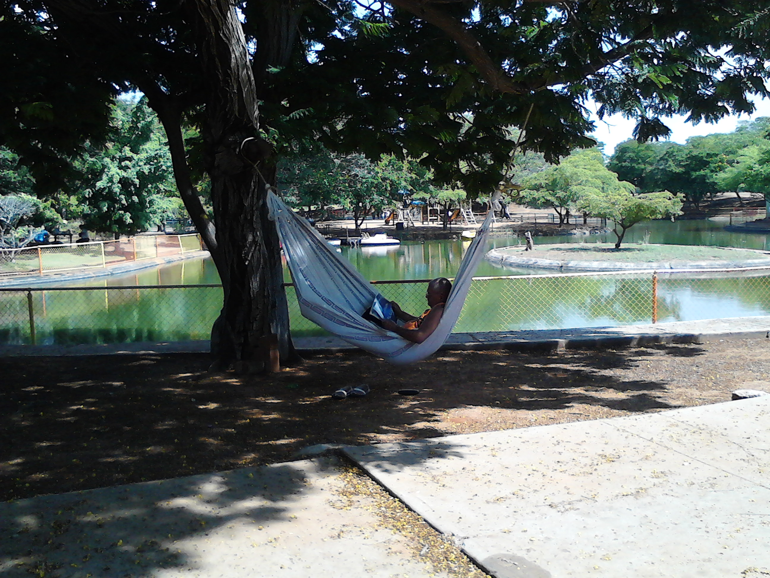 Archivo de tipo JPEG